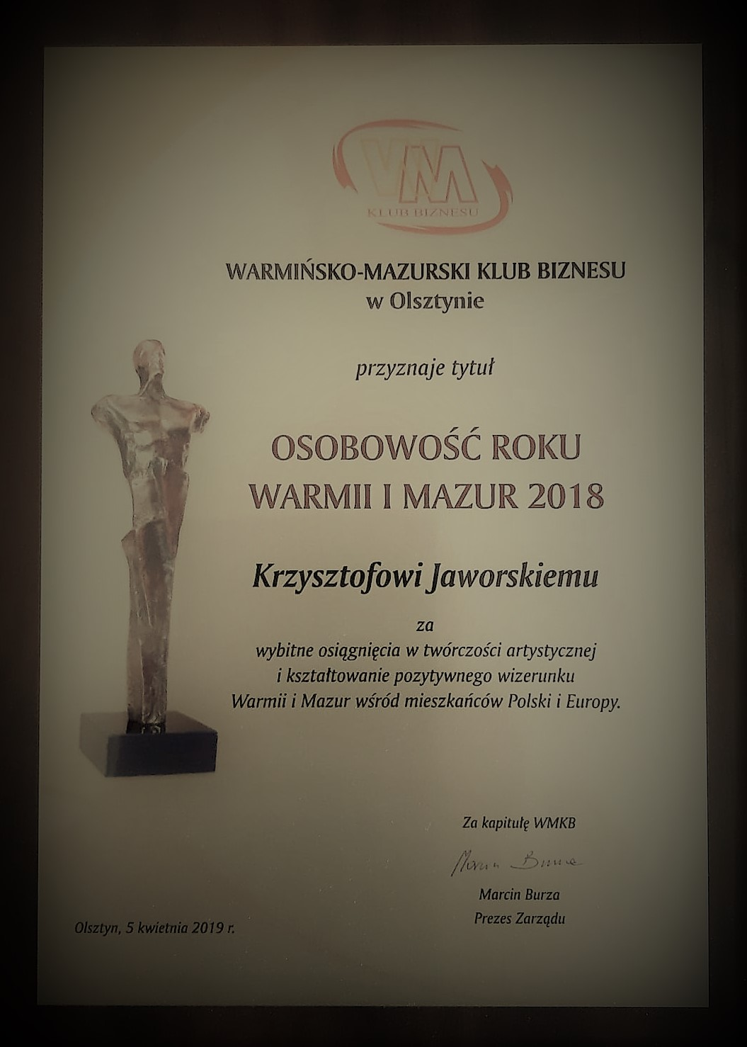 Nagroda "Osobowości Roku 2019" dla gitarzysty Krzysztofa Jaworskiego